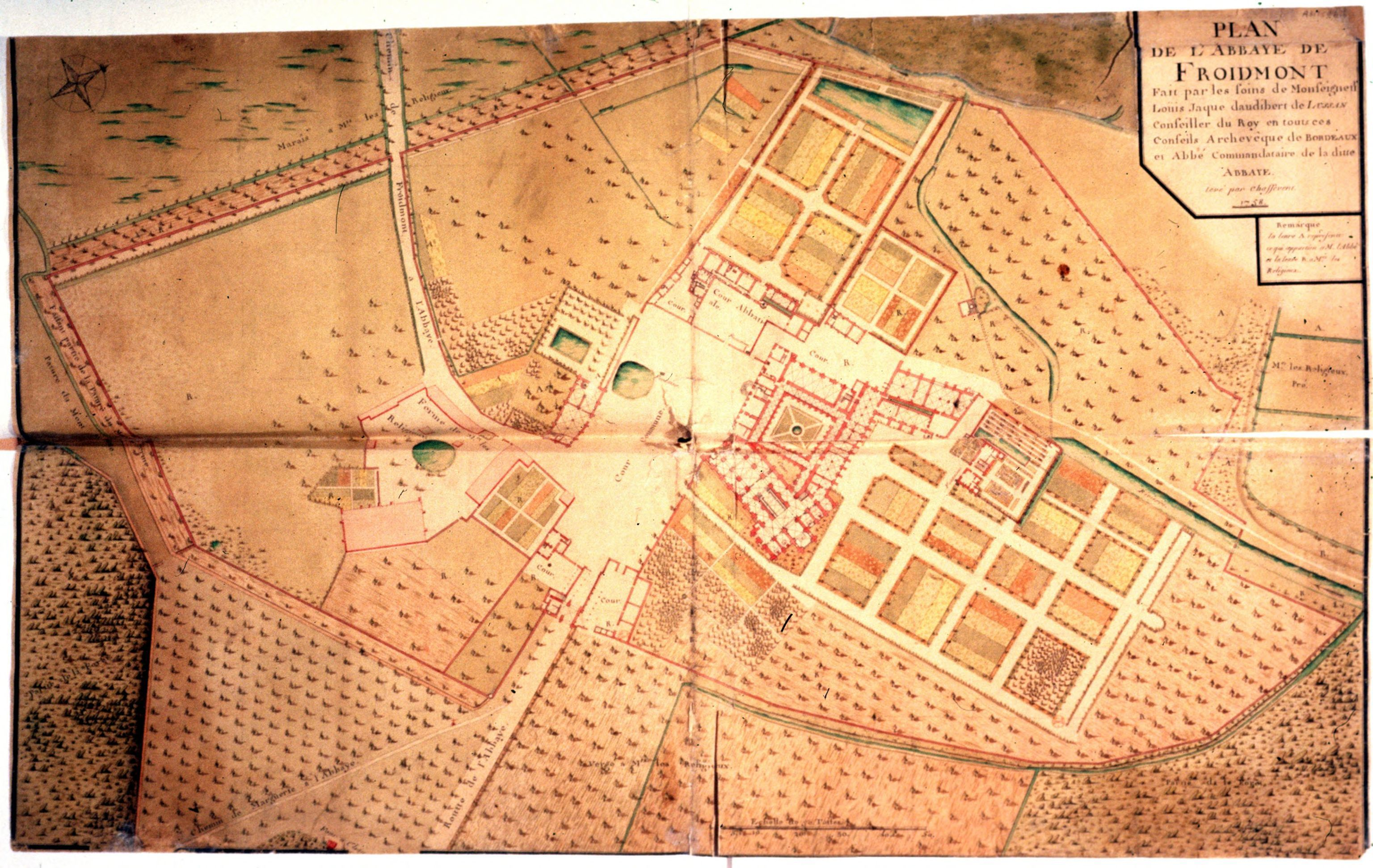 Plan de l'abbaye de Froidmont à Hermes (Oise). Fait par les soins de Monseigneur Loüis Jaque daudibert de Lussan, conseiller du Roy en touts ces conseils, Archevêque de Bordeaux et Abbé Commandataire de la ditte Abbaye.